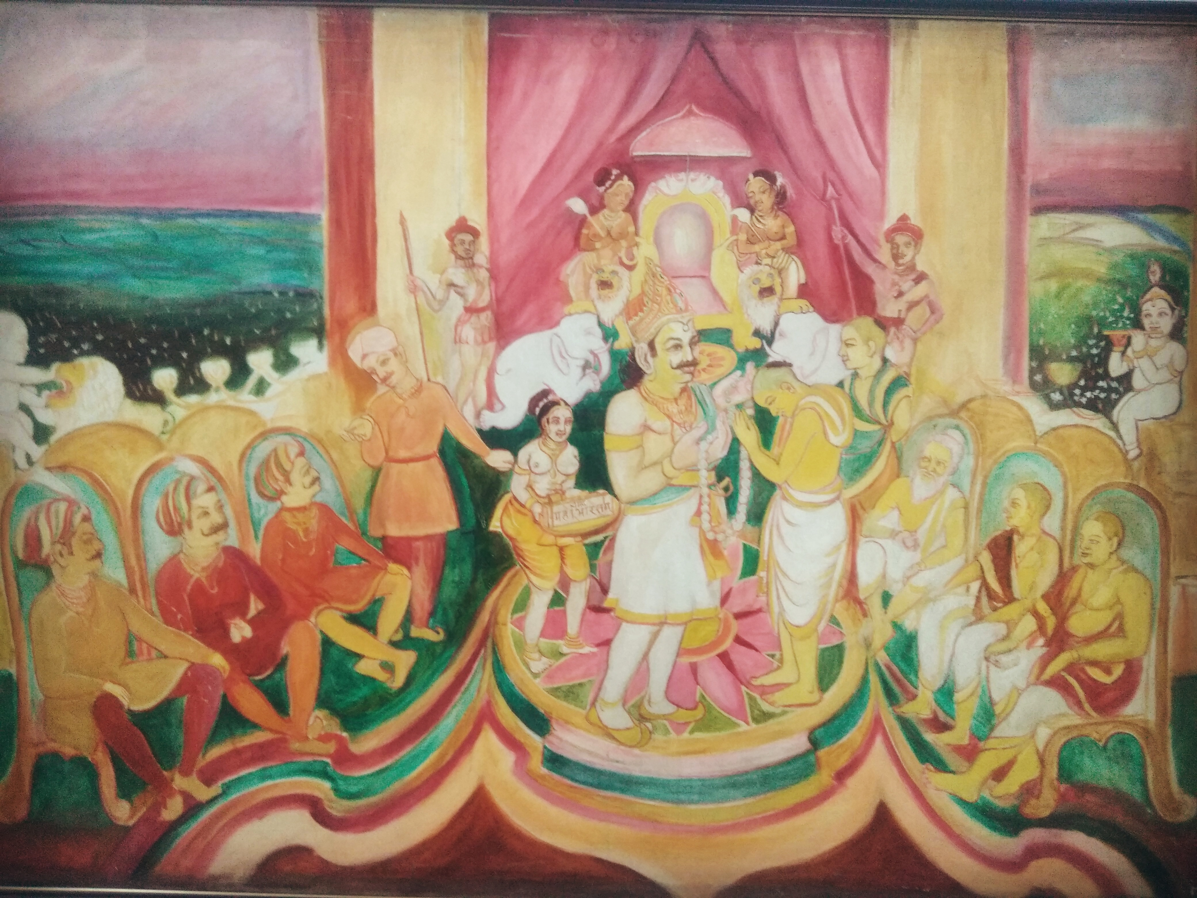 రాజరాజనరేంద్రుడు మహాభారతాన్ని తెనిగించమని నన్నయ్య భట్టారకుడిని అర్థించి సన్మానించే సన్నివేశం. Raja Rajanarendra commissioning Nannaya Battaraka to render Mahabharatha into telugu and offers him flowers etc in token. Artist:CVR Chowdary.